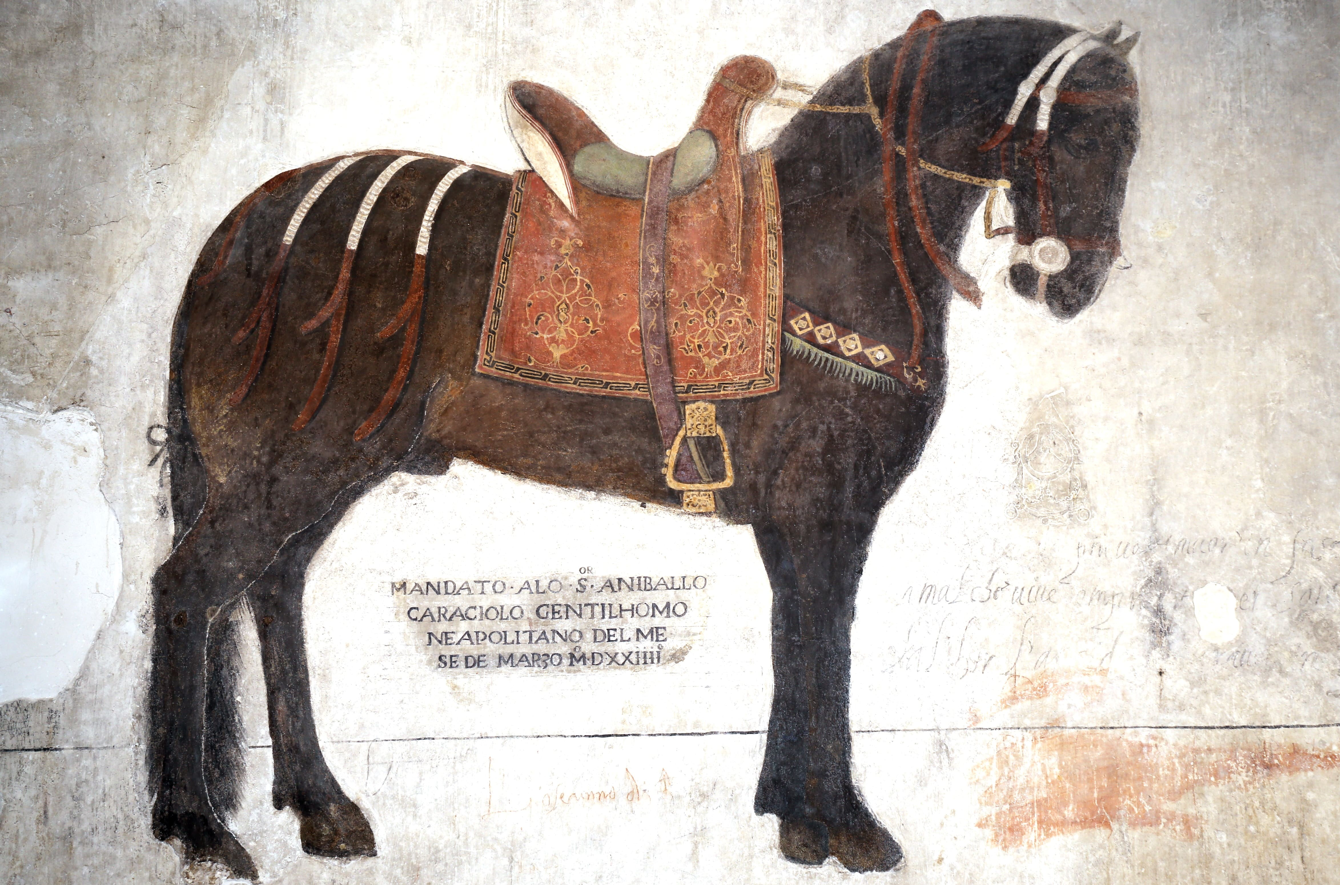 Fresques chevaux peints de Enrico Pandone